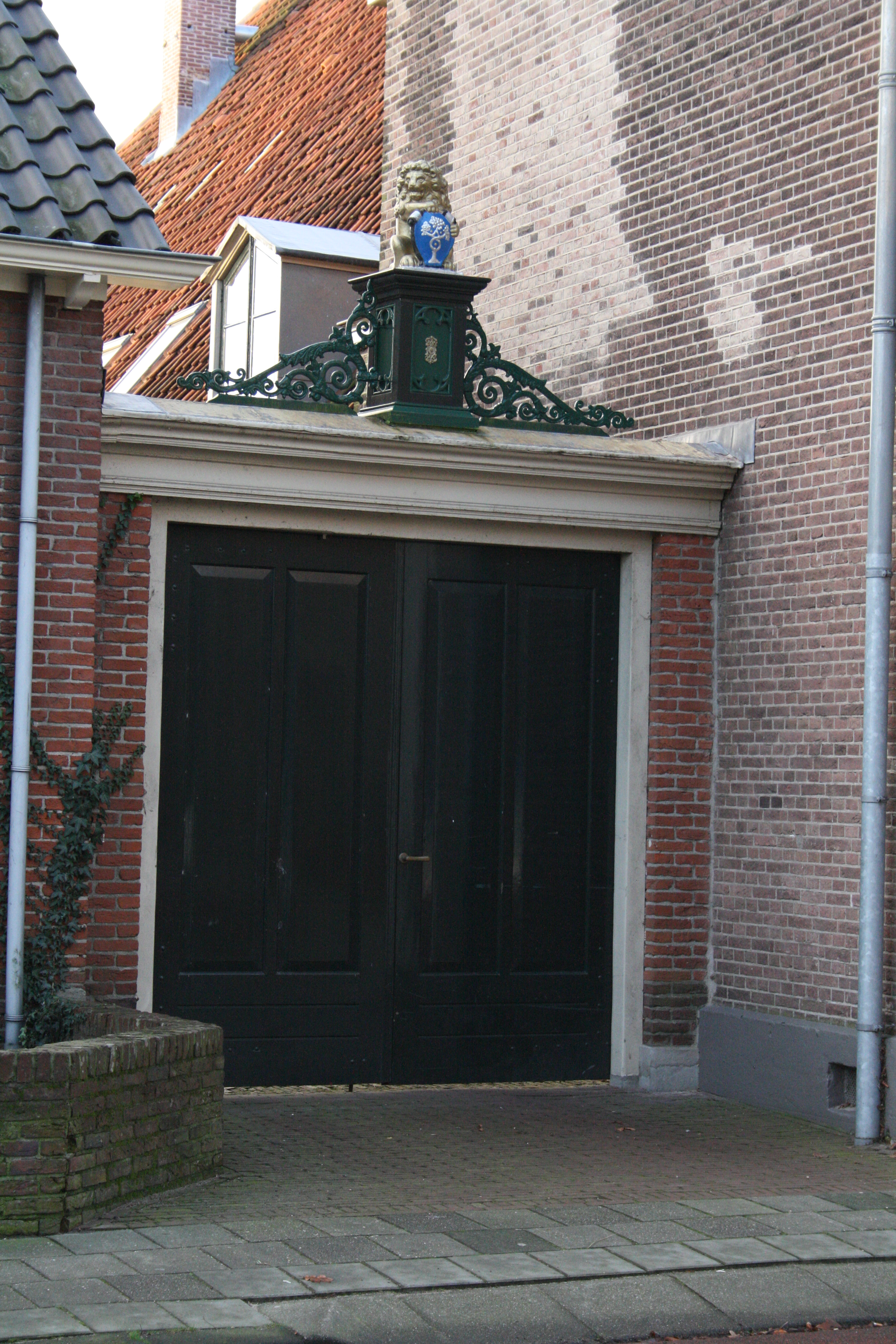 Poortje van de Schuilhoeve in Grootebroek. Op het poortje staat een leeuw met het wapen van Grootebroek